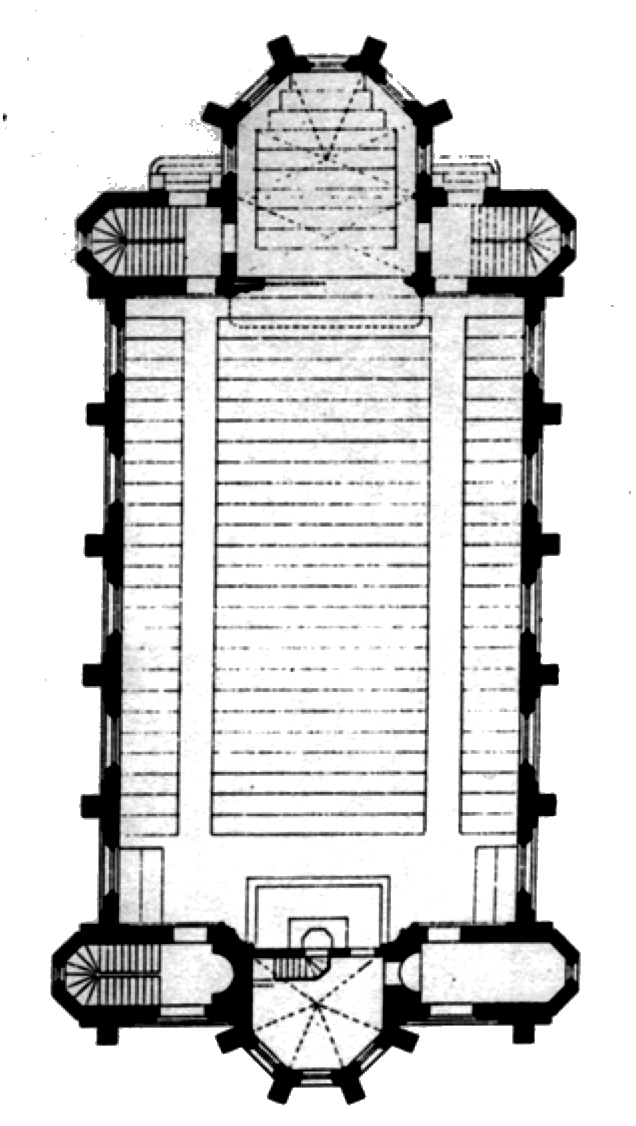 Grundriss der Pauluskirche, Wuppertal-Unterbarmen, 1882